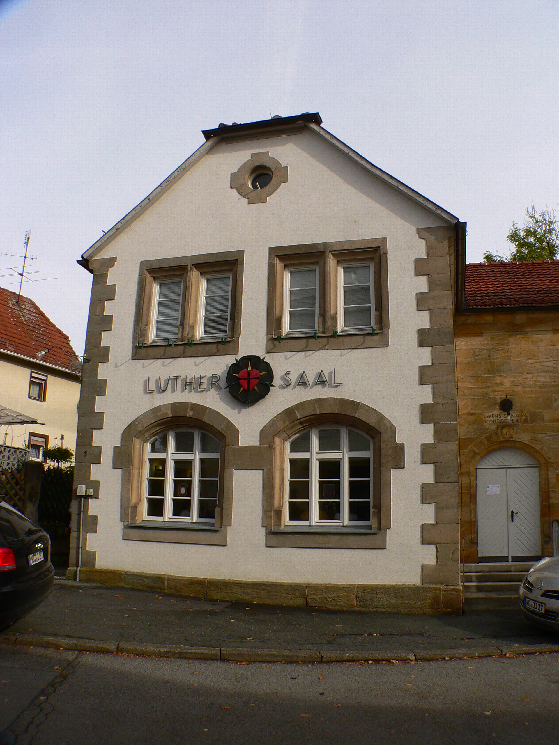 Luthersaal in Küps, Landkreis Kronach, Regierungsbezirk Oberfranken, Bayern